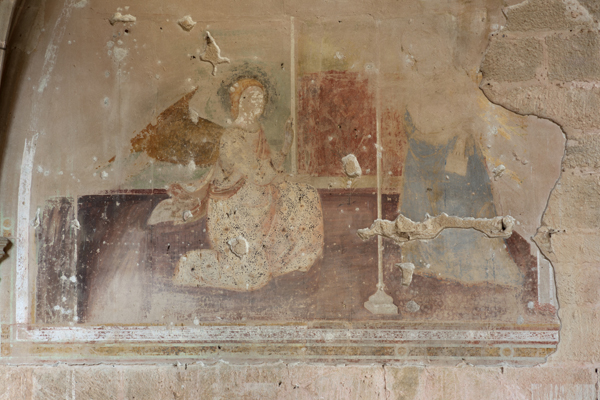 Anunciació atribuïda a Ferrer Bassa que es troba al claustre del monestir de Santes Creus